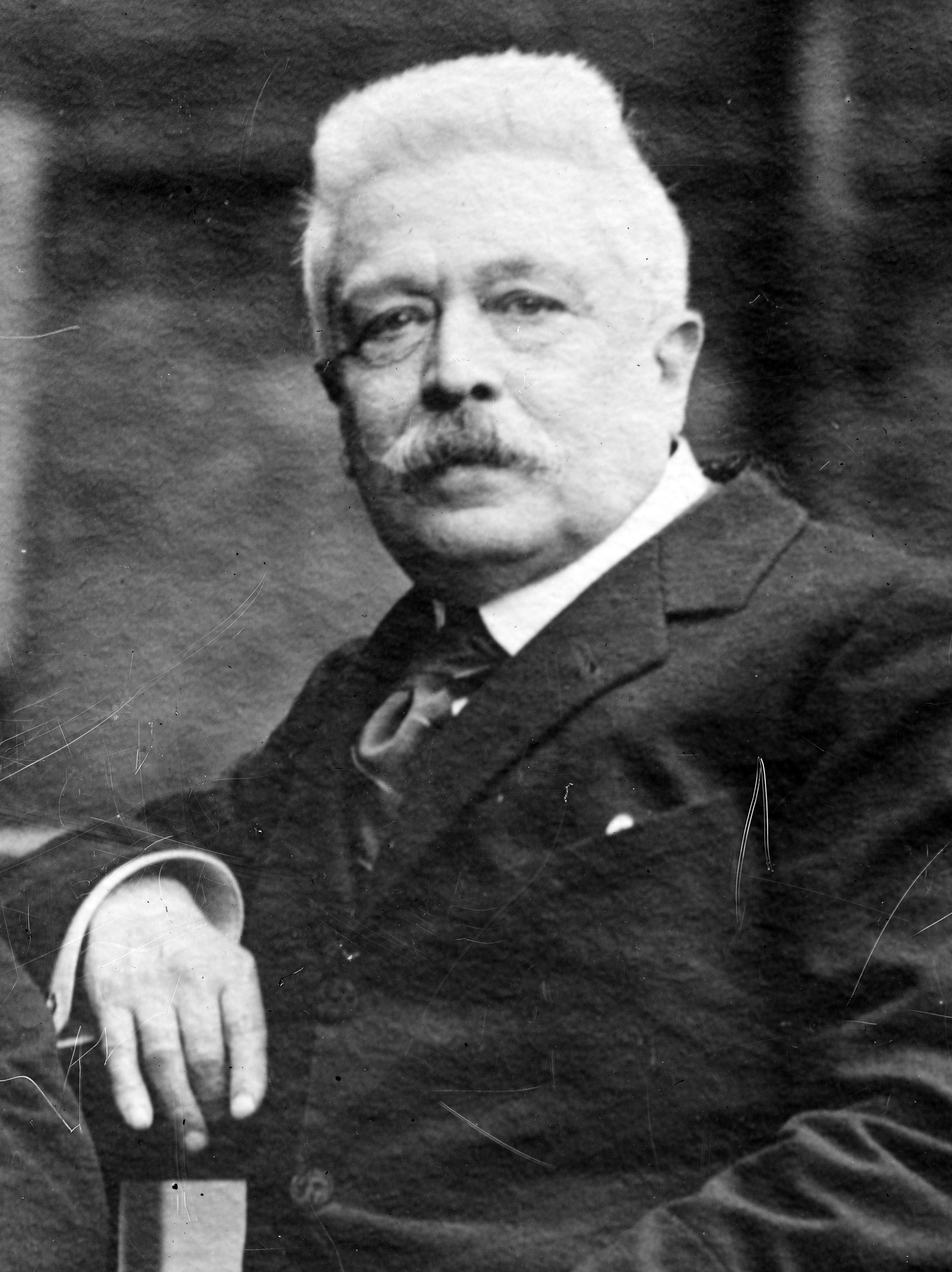 El político y primer ministro italiano Vittorio Emanulle Orlando, hacia 1919.